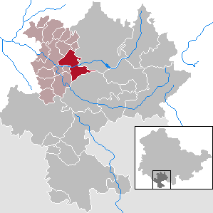 Kloster Veßra in Thuringia - district Hildburghausen